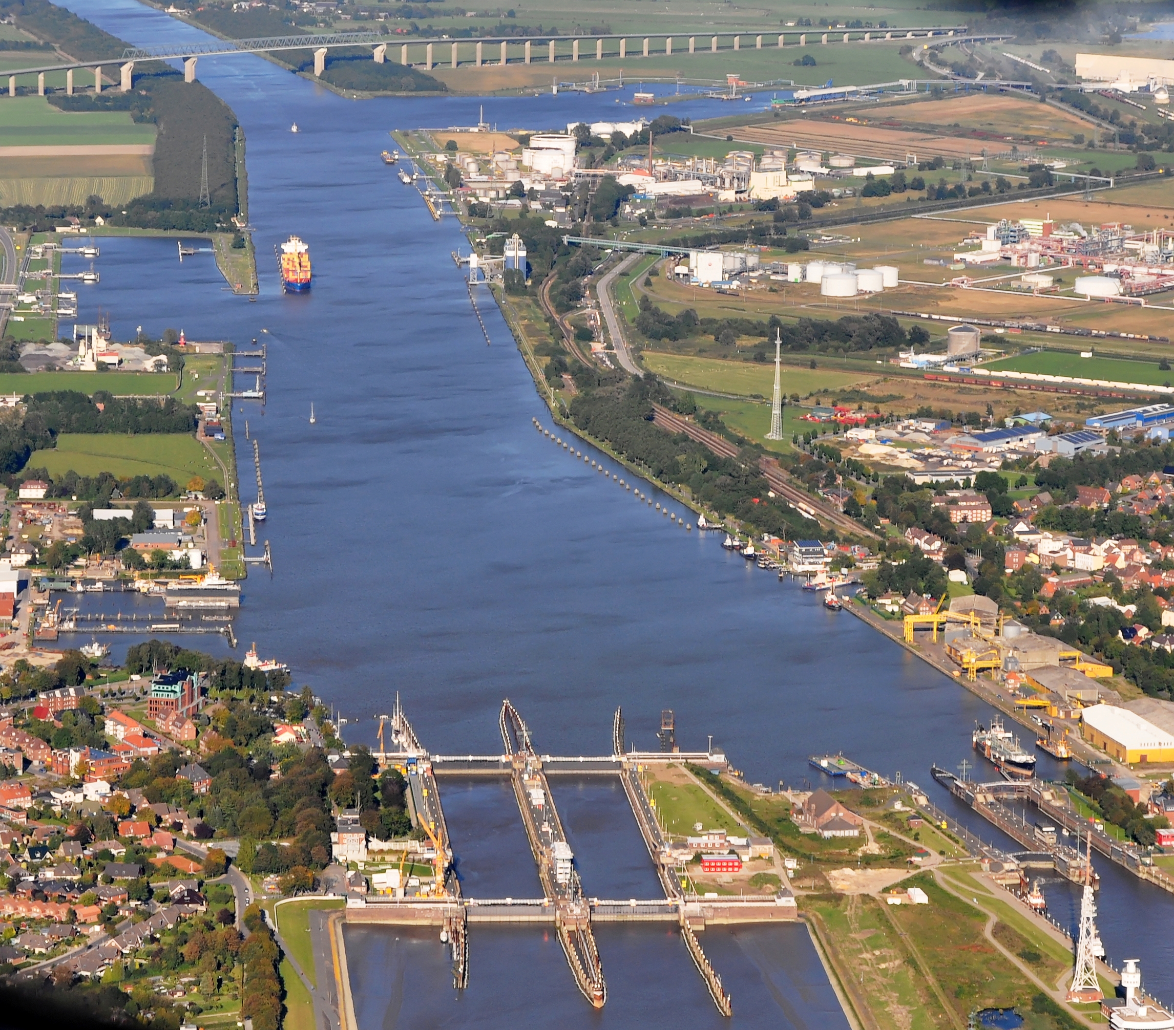 Luftaufnahme: Schleuse Brunsbüttel